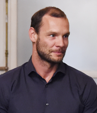 Juraj Tarr, december 2015